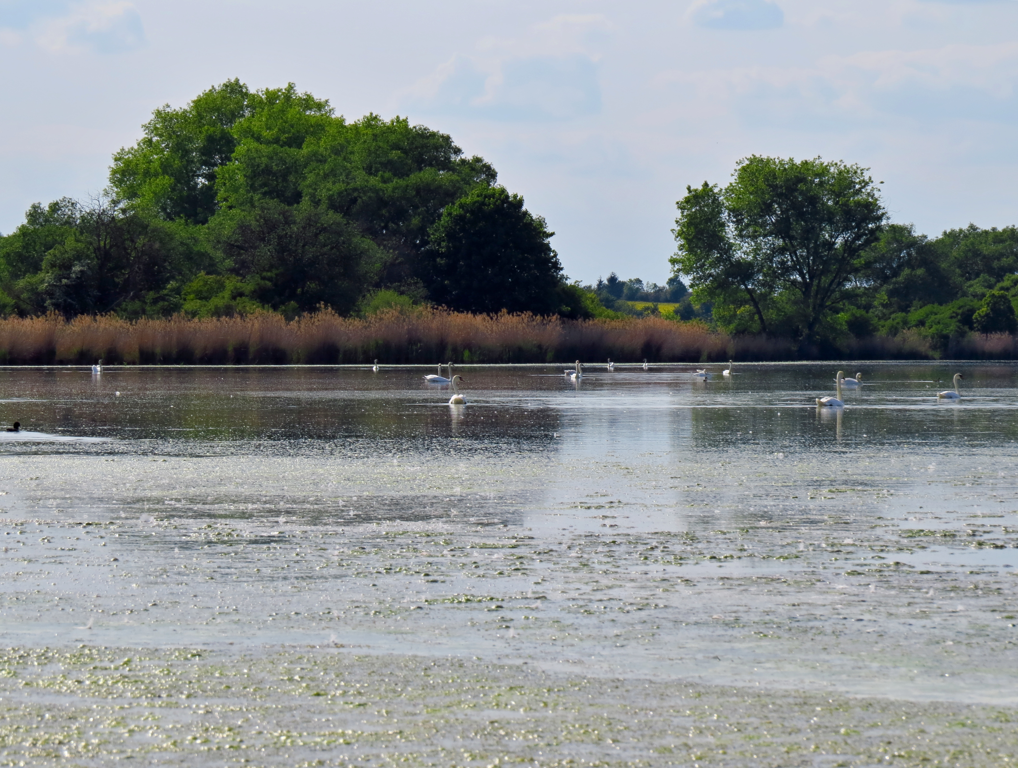 Project: Chráněná území